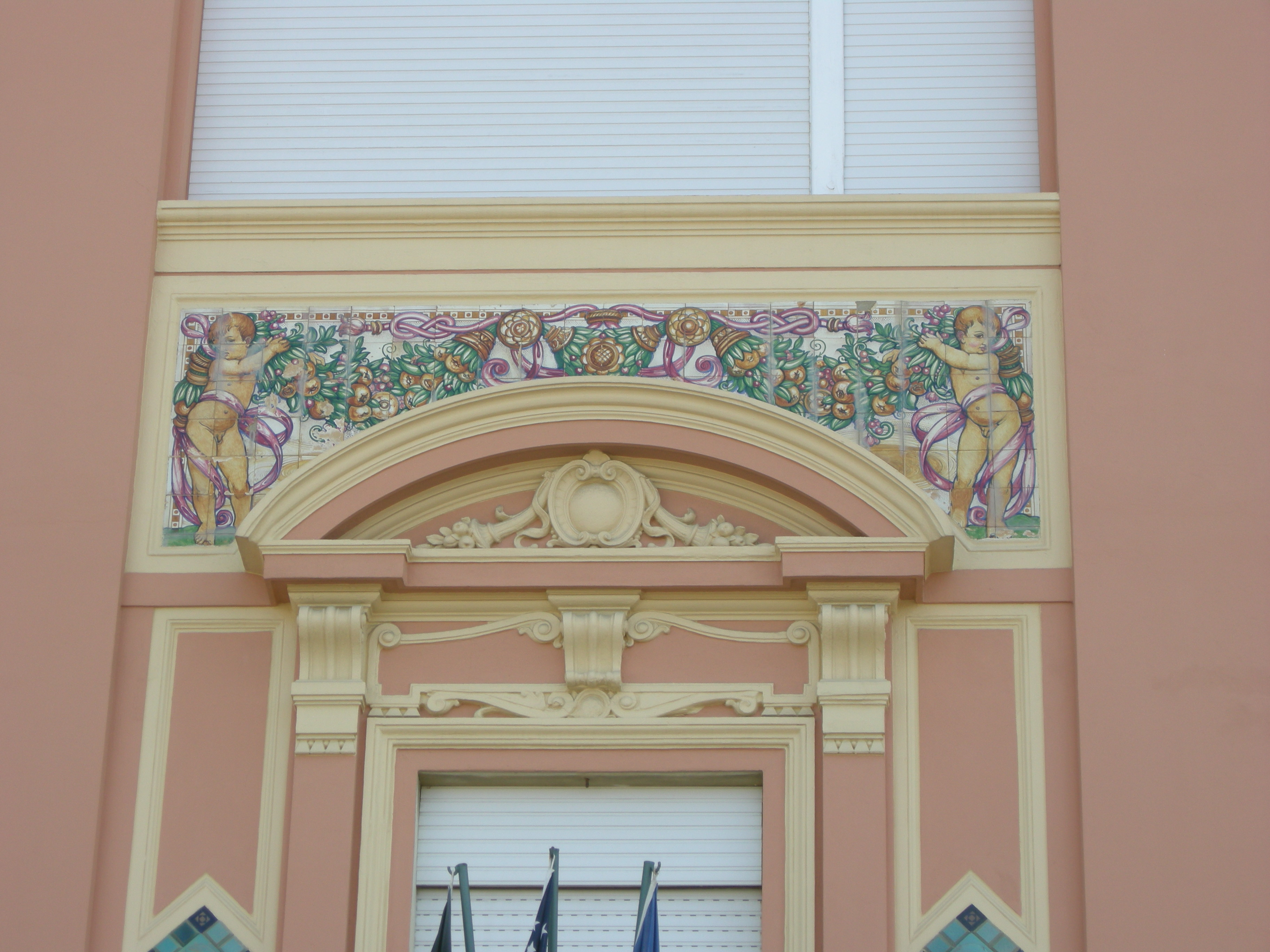 Hotel liberty, viareggio, ceramiche